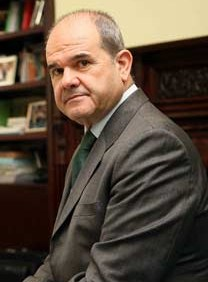 (Foto recortada) Manuel Chaves, político andaluz.